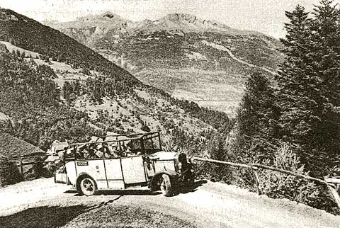 Tschiertscherstrasse